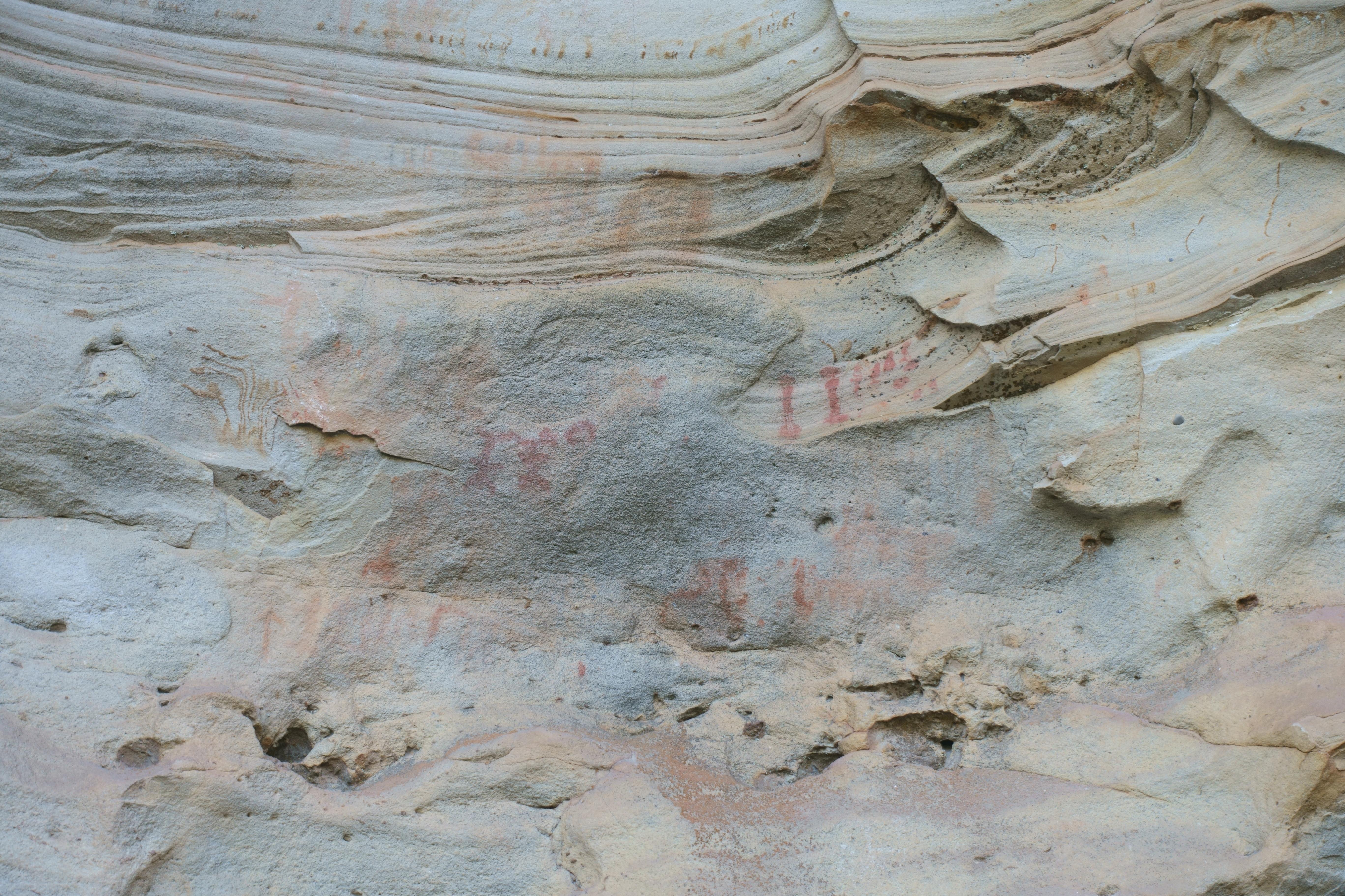 Estación rupestre de La Lastra, en el monte Valonsadero (Soria, España).